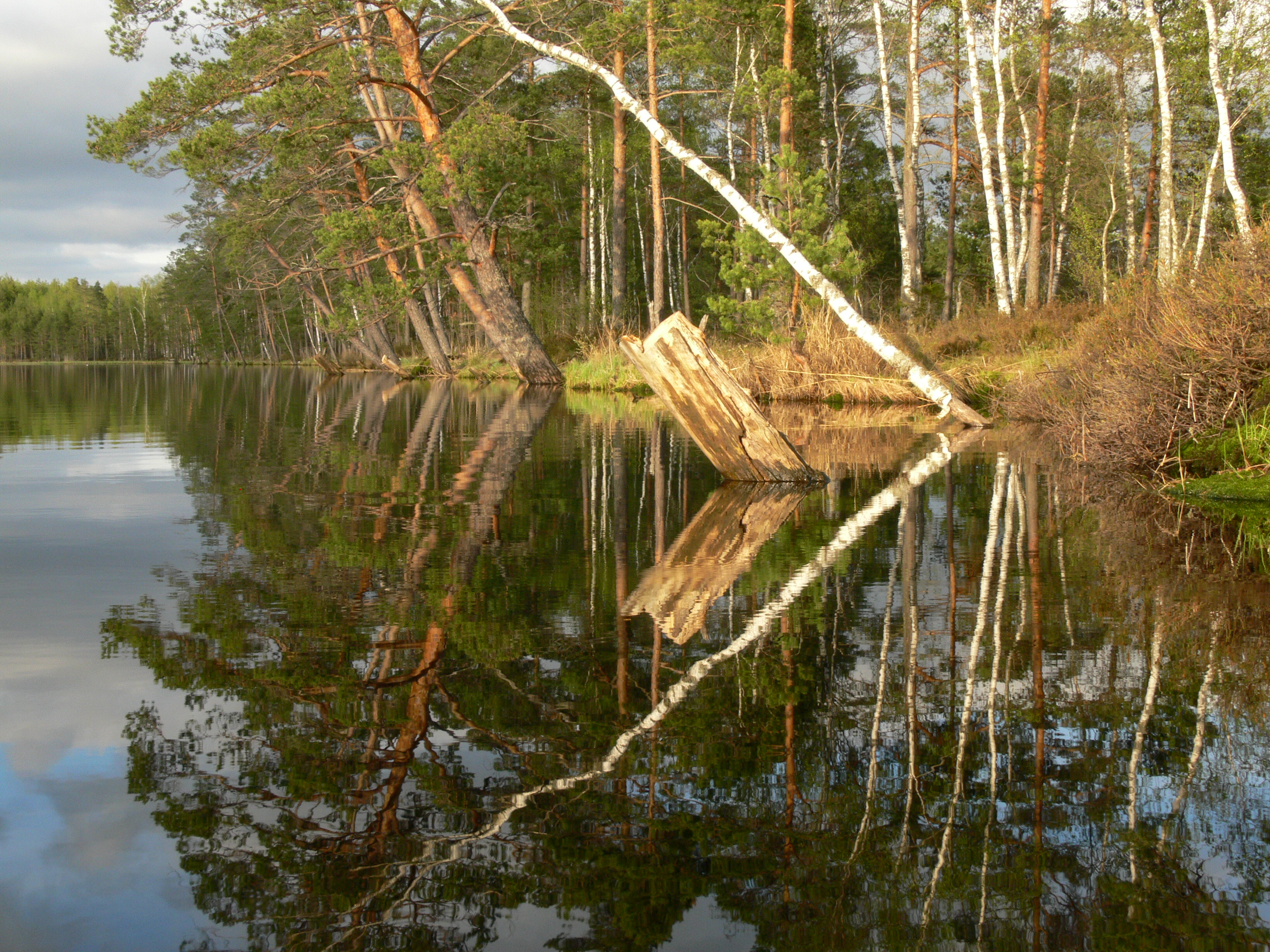 Põlvamaa